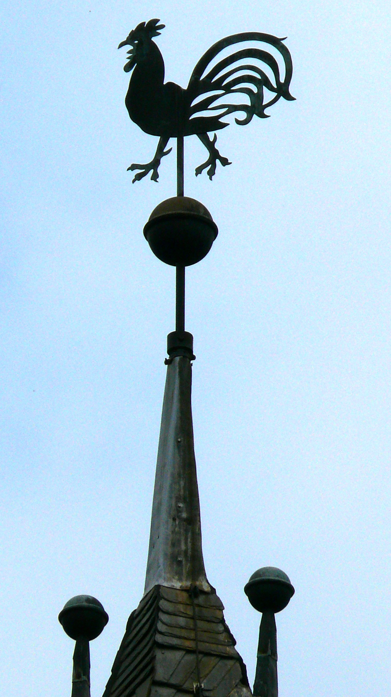 Schloß Marienburg - Wetterhahn vom Innenhof aus gesehen